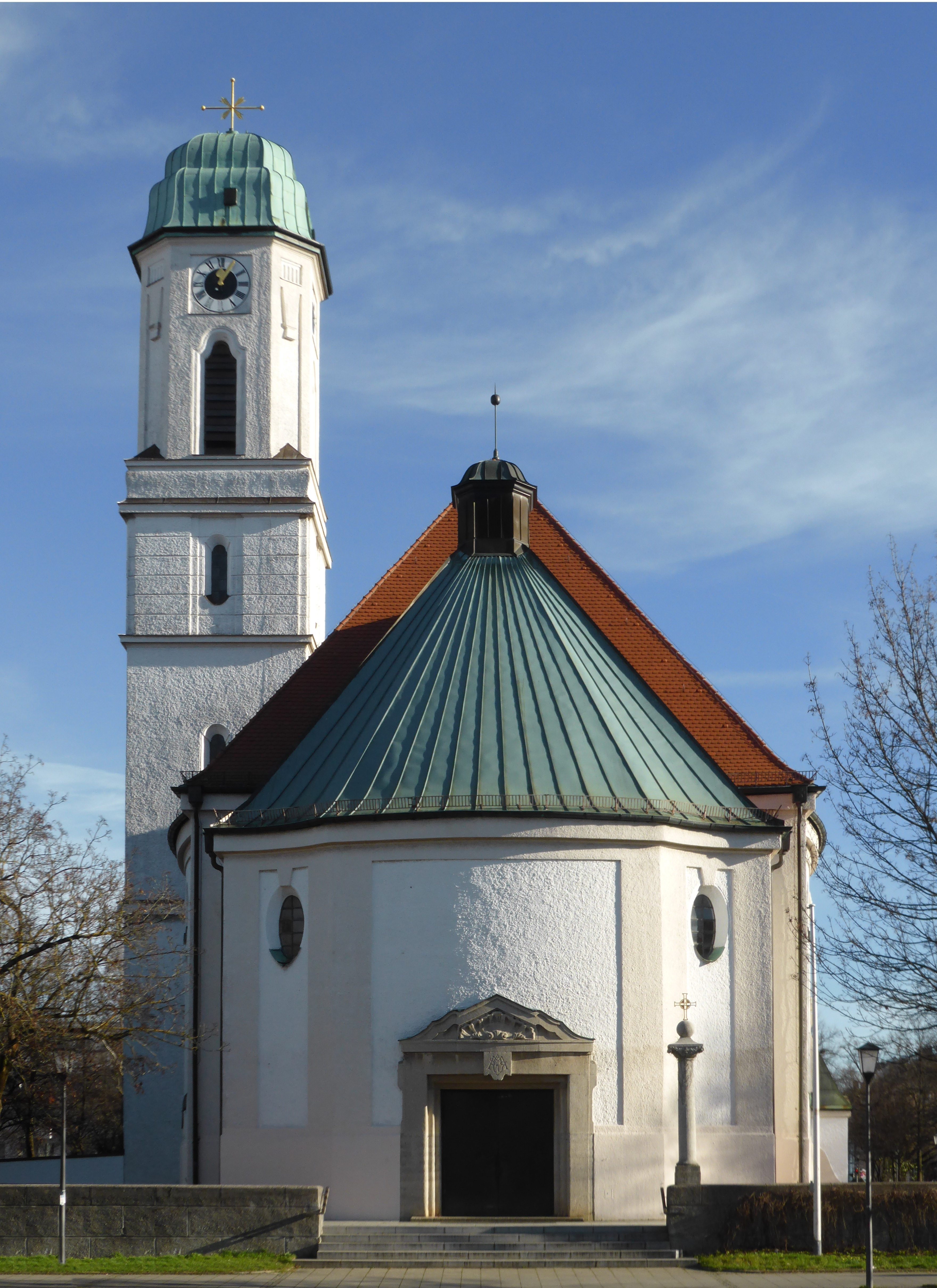 Neue Georgskirche in München-Milbertshofen, von Westen gesehen.